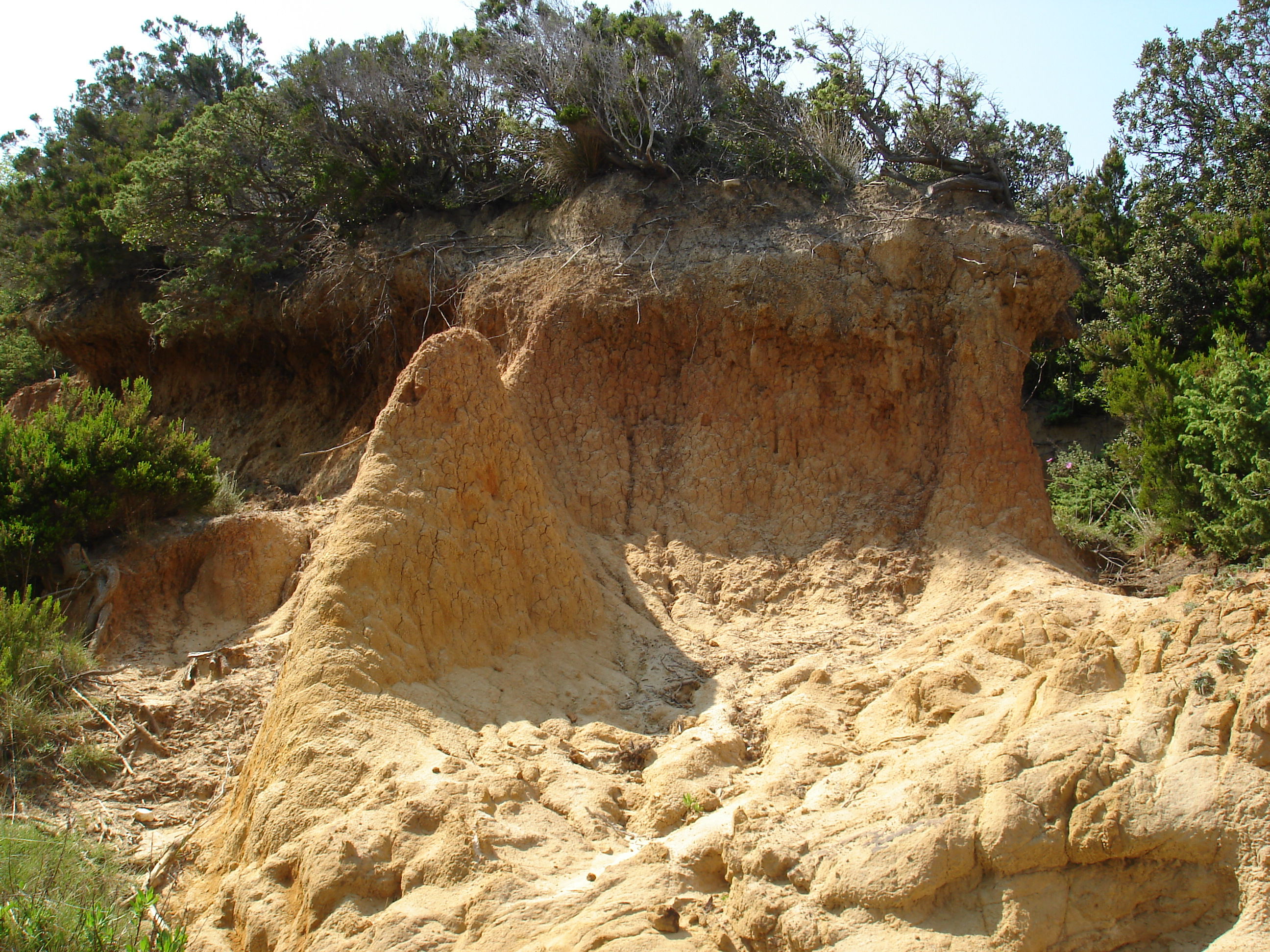 rab